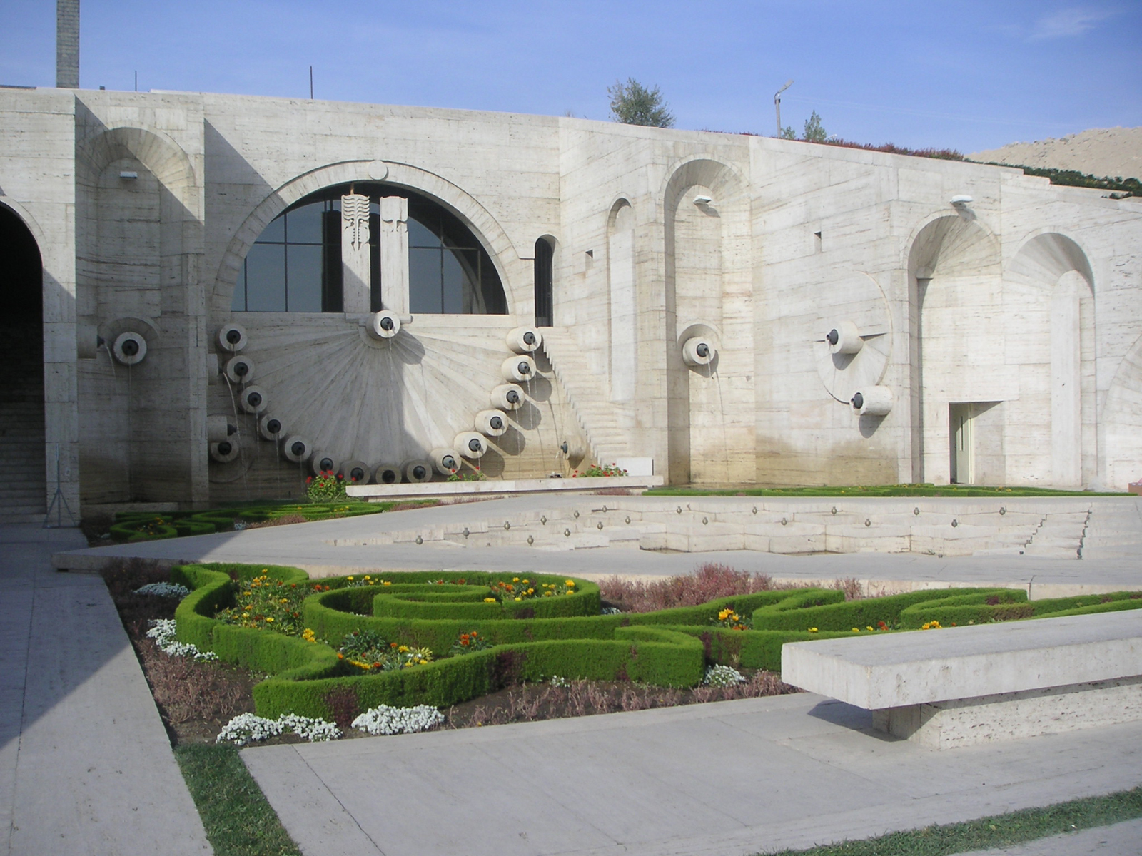 Détail des Cascades à Erevan